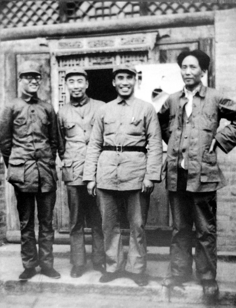 Depicted people: Mao Zedong, Zhu De, Zhou Enlai and Bo Gu